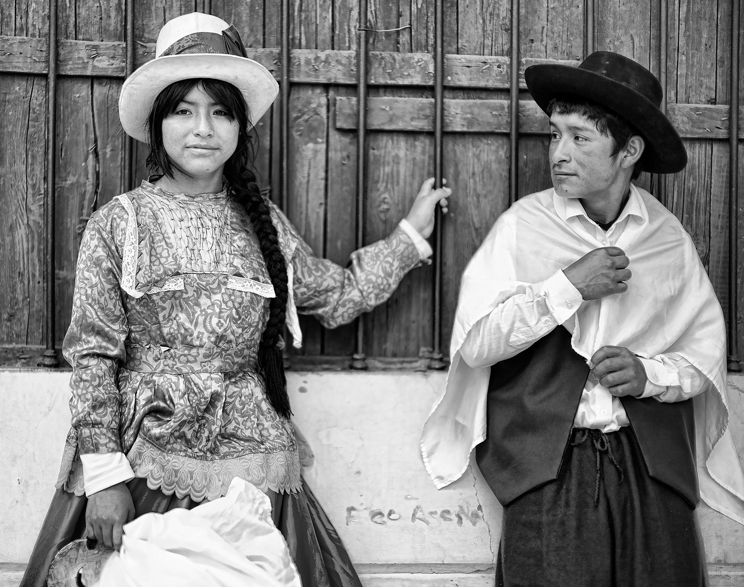 Male and female Peruvian